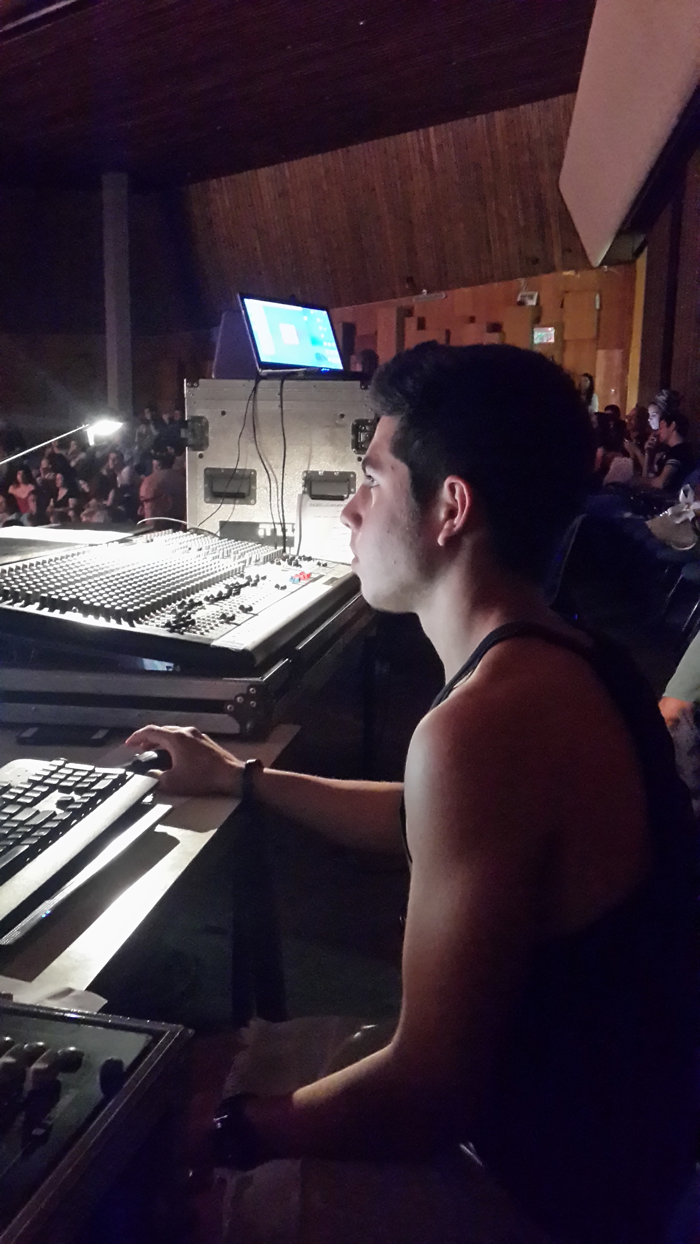 רכז ענף הגברה ותאורה בזמן אירוע